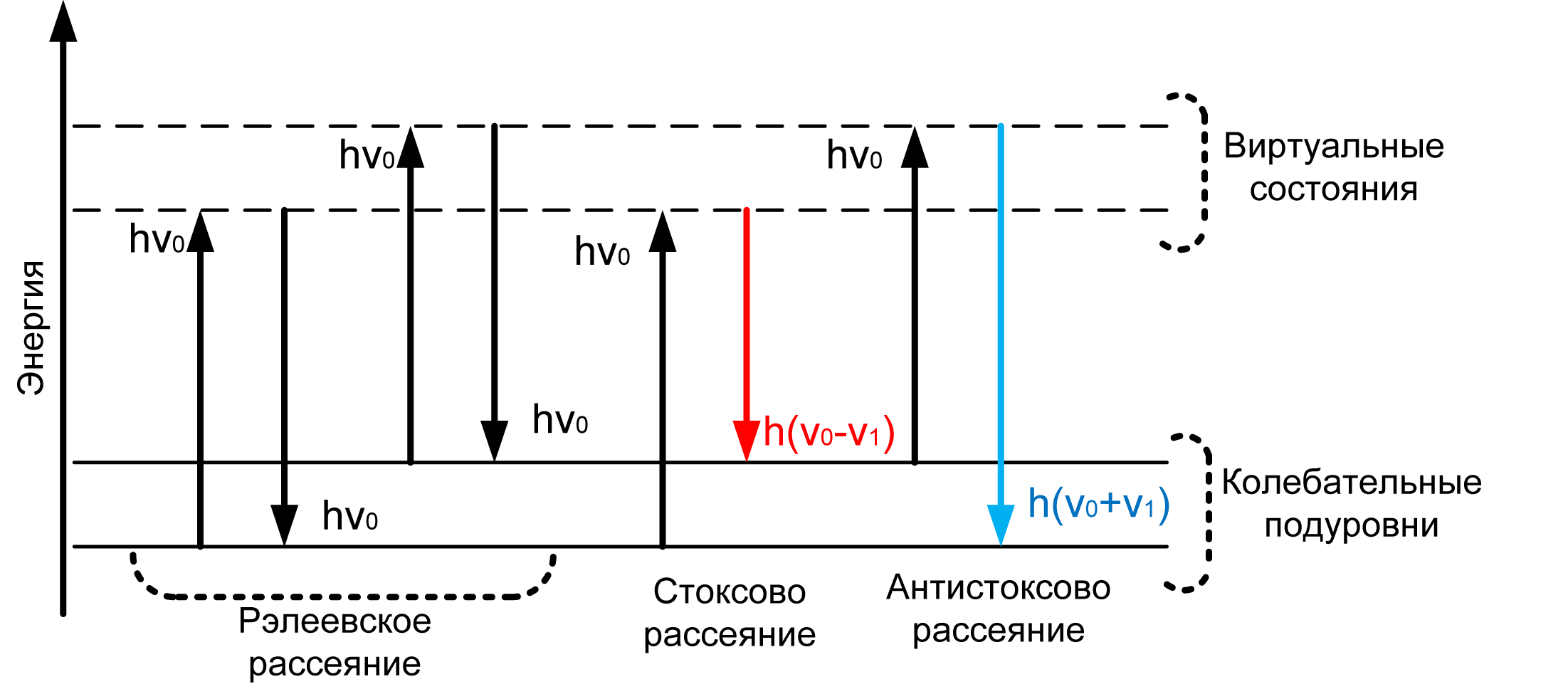 Иллюстрация квантовой теории, объясняющей комбинационное рассеивание.